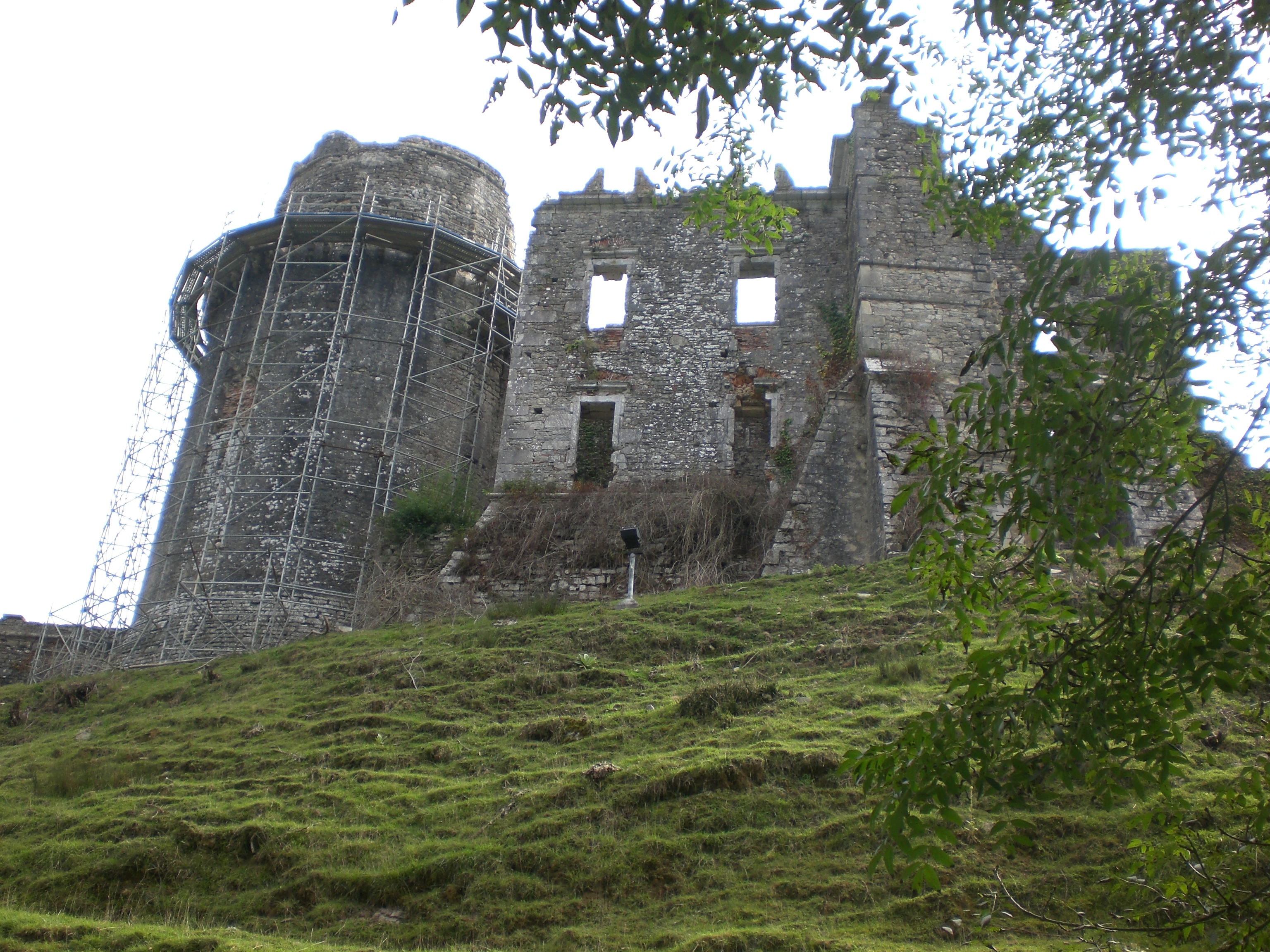 Agramondarren gazteluaren argazkia.